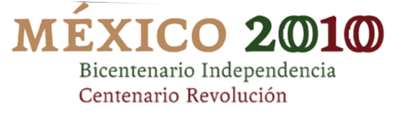 México Bicentenario